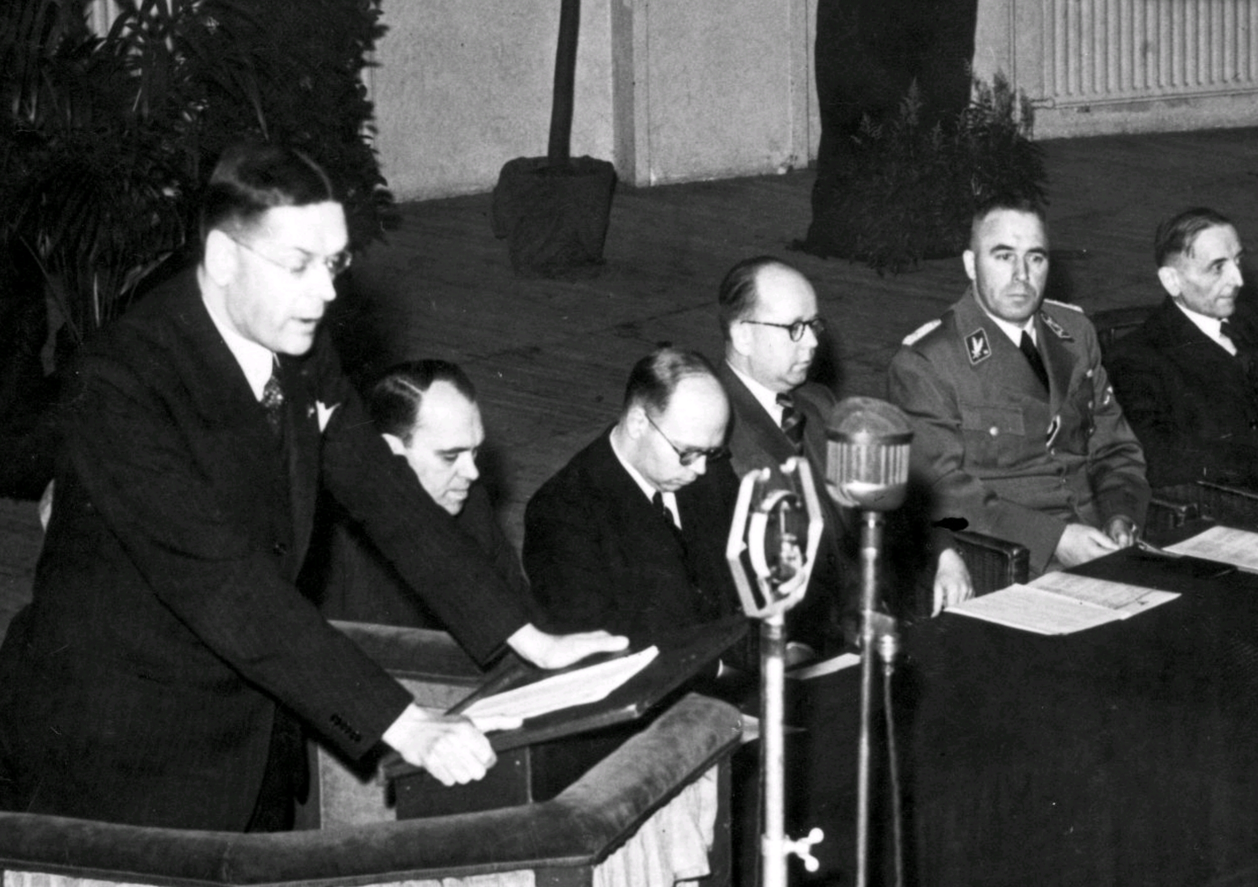 Dr. Tobie Goedewaagen, secretaris generaal van het departement van volksvoorlichting en kunsten, tijdens zijn rede voor de grote vergadering van het Verbond van Nederlandsche Journalisten, Utrecht, 3 mei 1941.